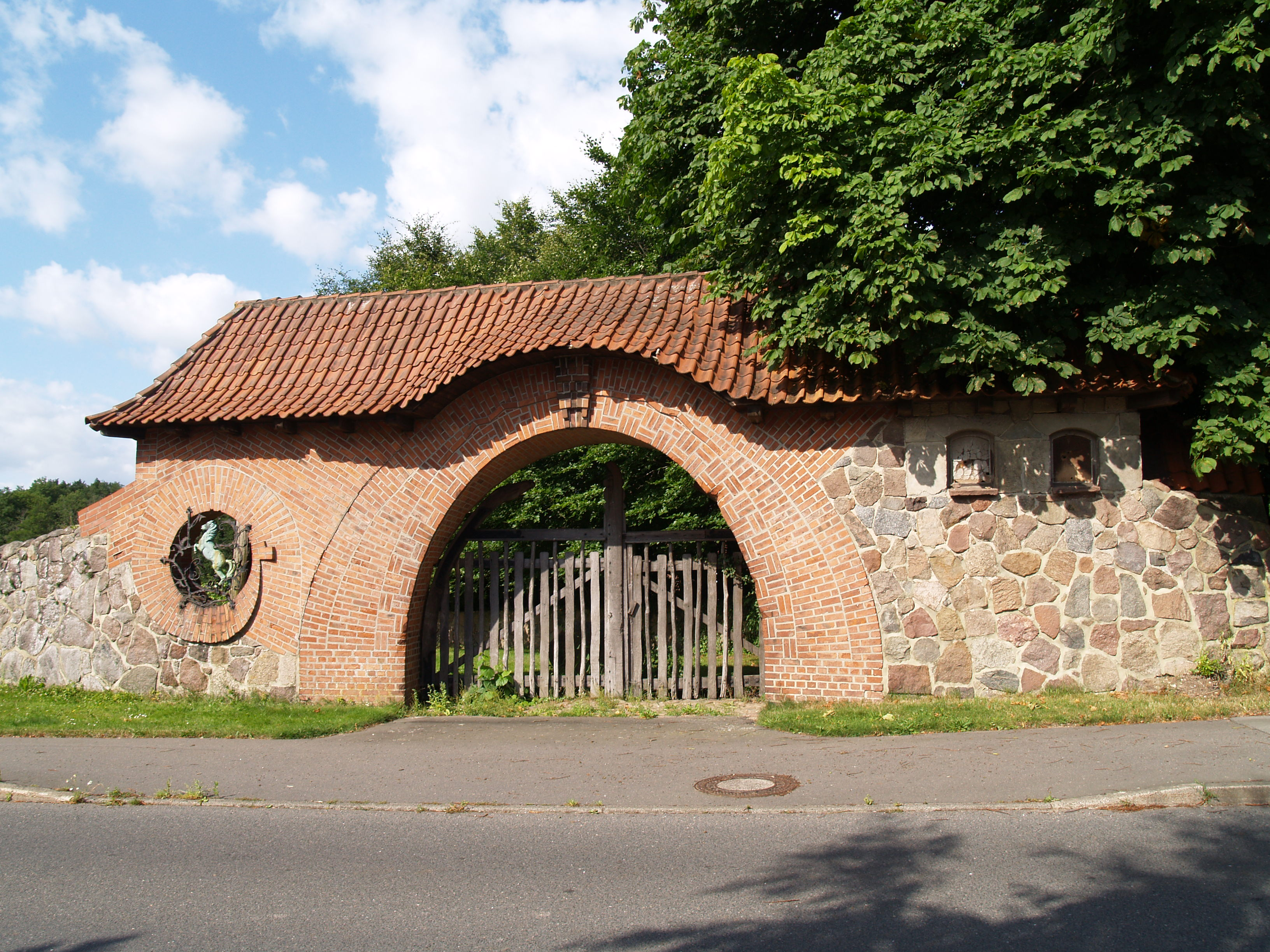 Tor, Gut Gülzow, Herzogtum Lauenburg, Deutschland